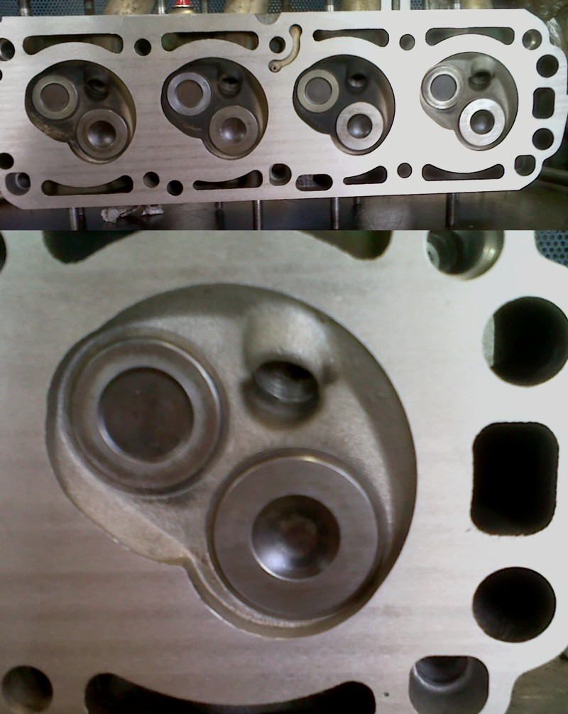 Testata per motore quadricilindrico 4 tempi ad accensione comandata, di cui in alto vista per intero, mentre in basso vi è il dettaglio della camera di combustione.